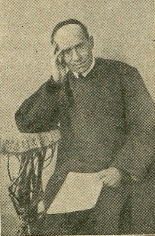 Bonifaz Rauch OSB, Kloster Metten, Professor und Dichter